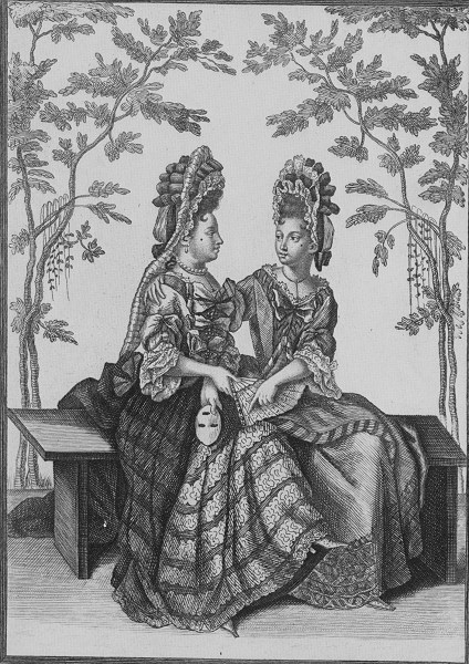 Дамы XVII века с мушками